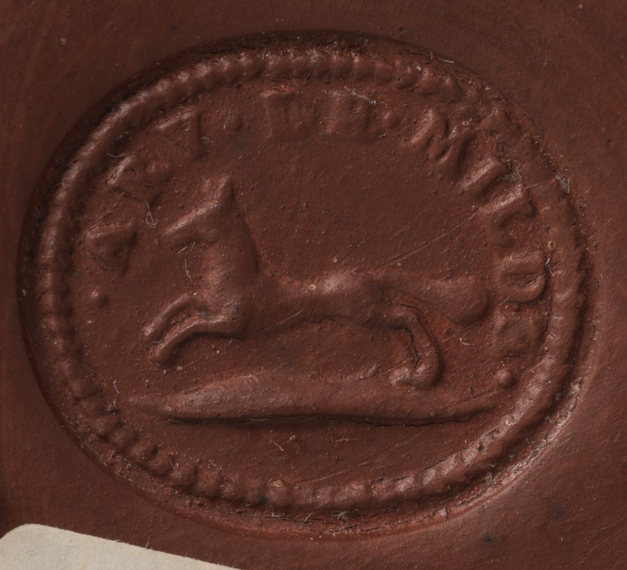 maker's mark Ary de Milde: onderzijde theepot, gestempeld: ovaal merk met naar links springende vos op grondje met rondschrift ARY.DE.MILDE (Ary de Milde, eigenaar De Gecroonde Theepot, 1692-1708)